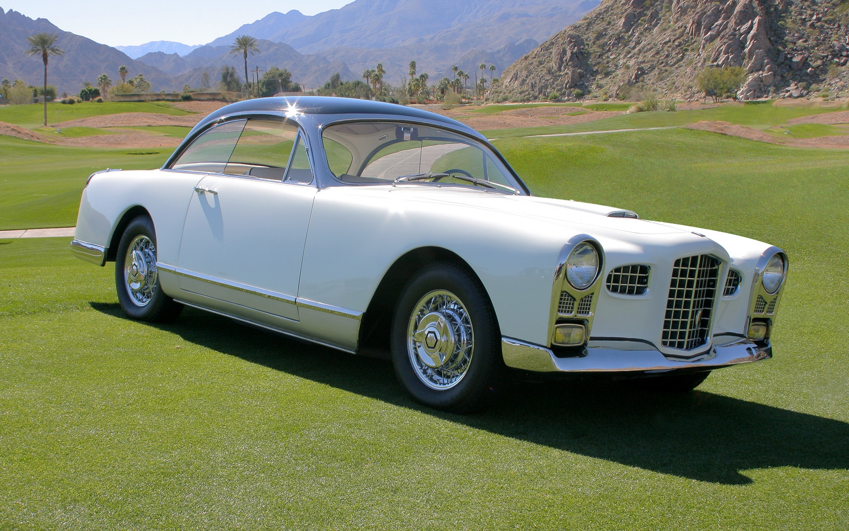 2011 Desert Classic, La Quinta, CA